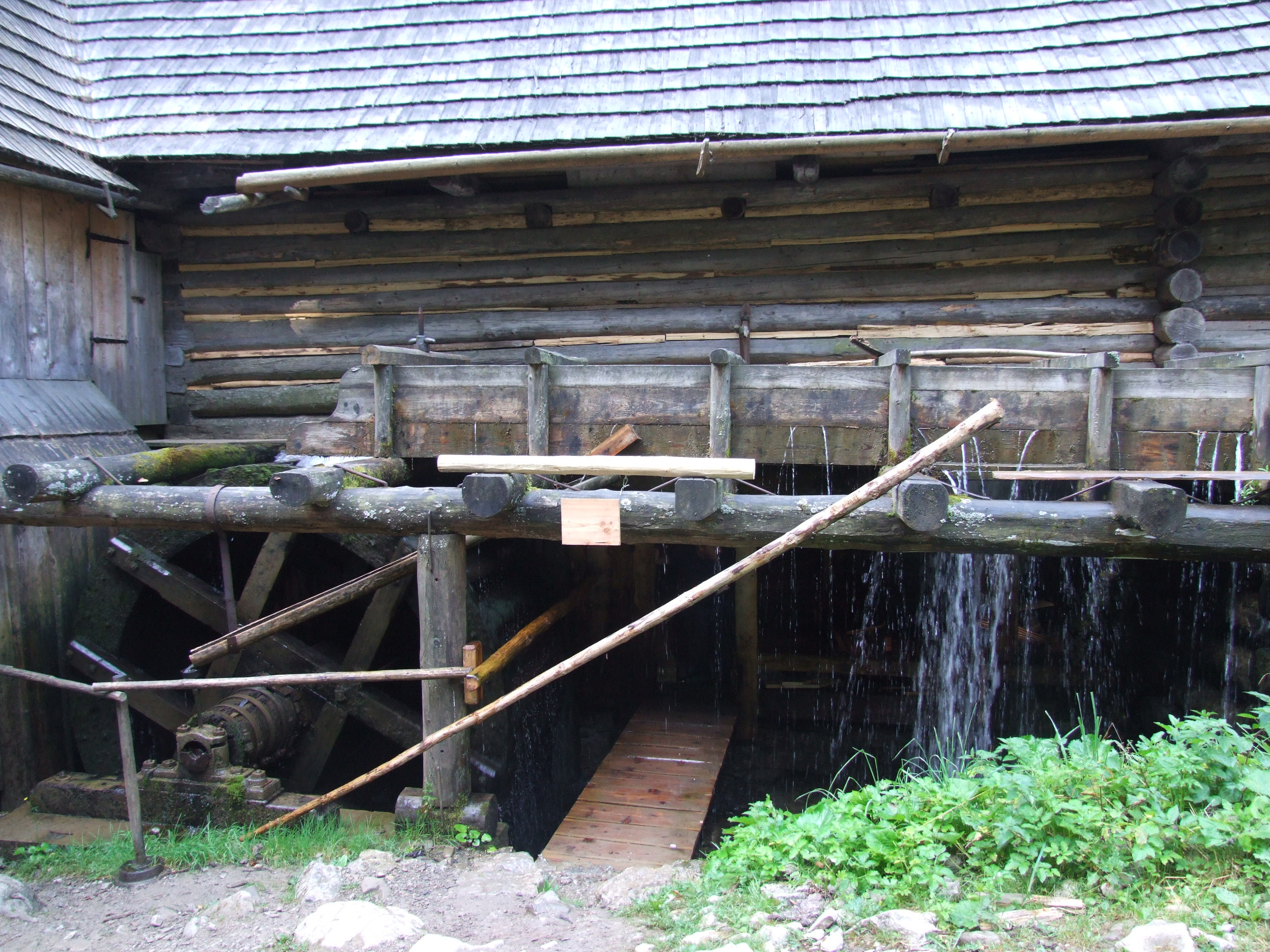 Obłazy Kwaczańskie. Stary młyn